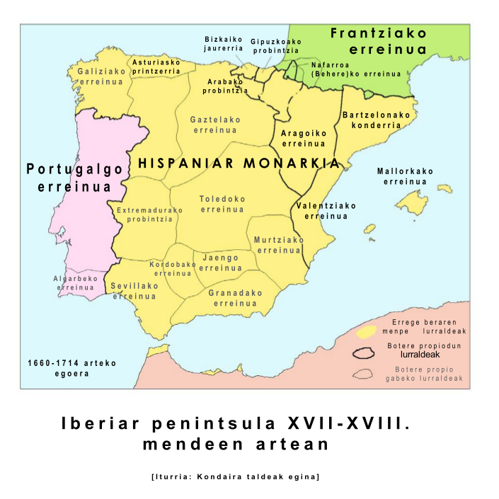 Iberiar penintsula XVII-XVIII mendeen artean, UEUren kondaira.eus webgunetik hartua.